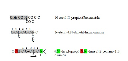 Nomenclatura de Aminas